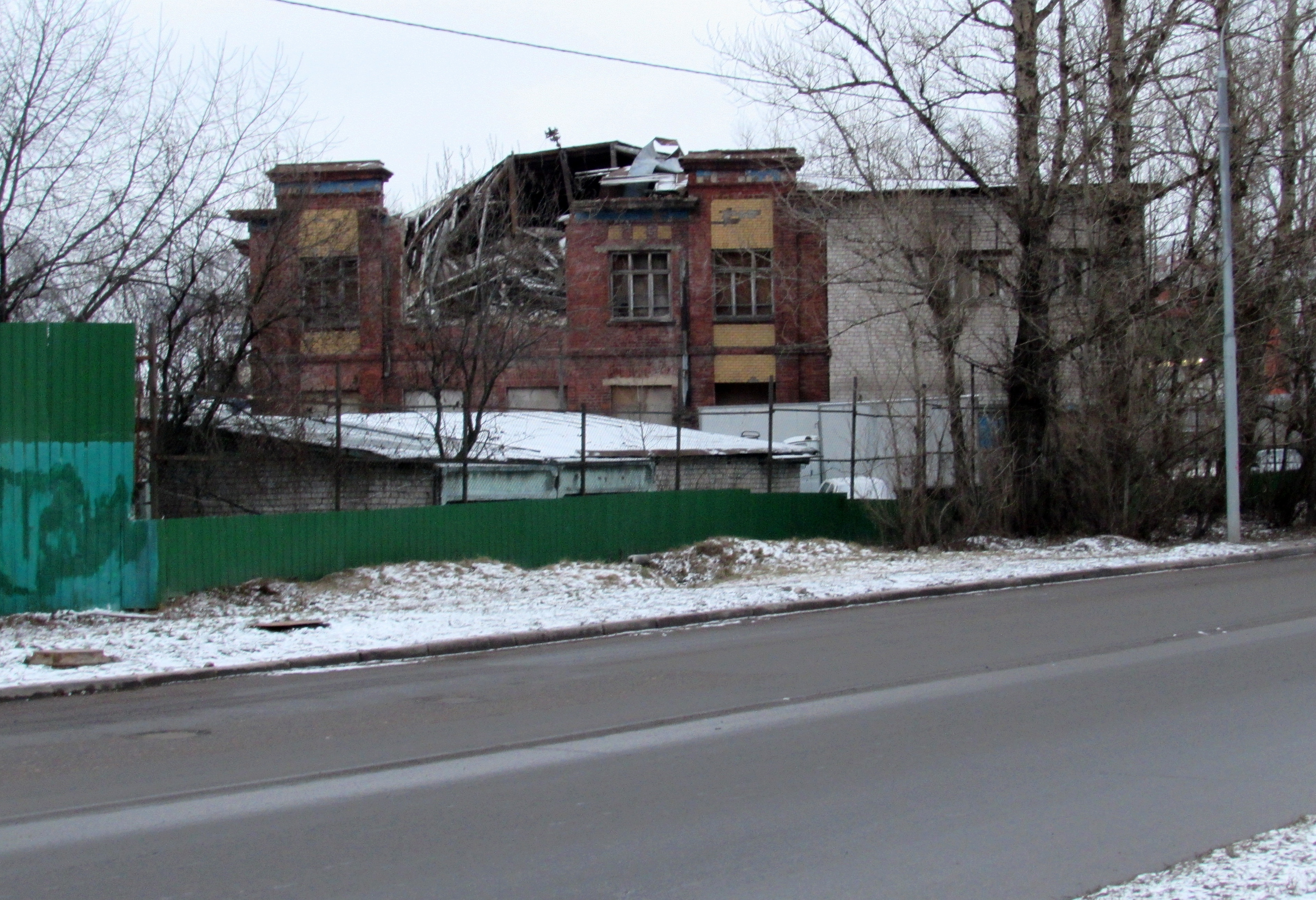 Москва, Бибирево, ул. Корнейчука, 27